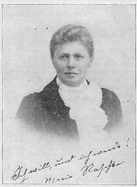 Porträtfoto der Juristin Dr. Marie Raschke, Berlin